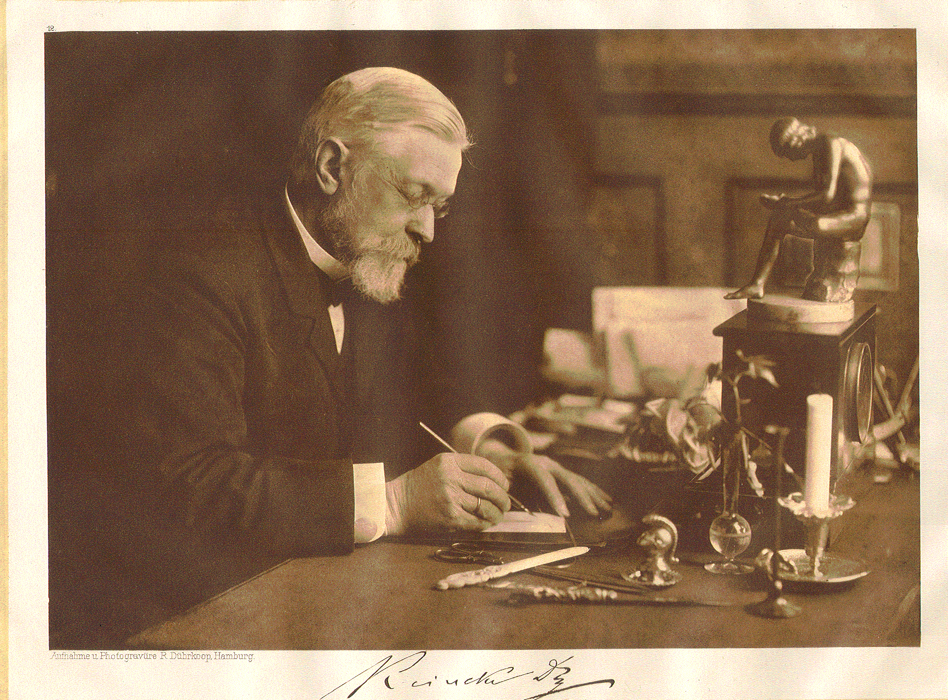 Julius Reincke (1842–1906) deutscher Arzt und Abgeordneter der Hamburgischen Bürgerschaft